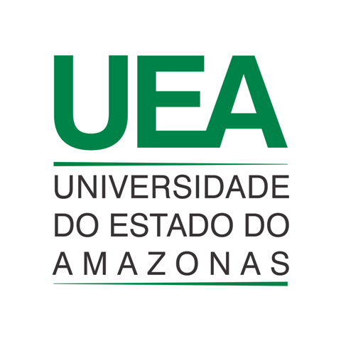 UEA AM